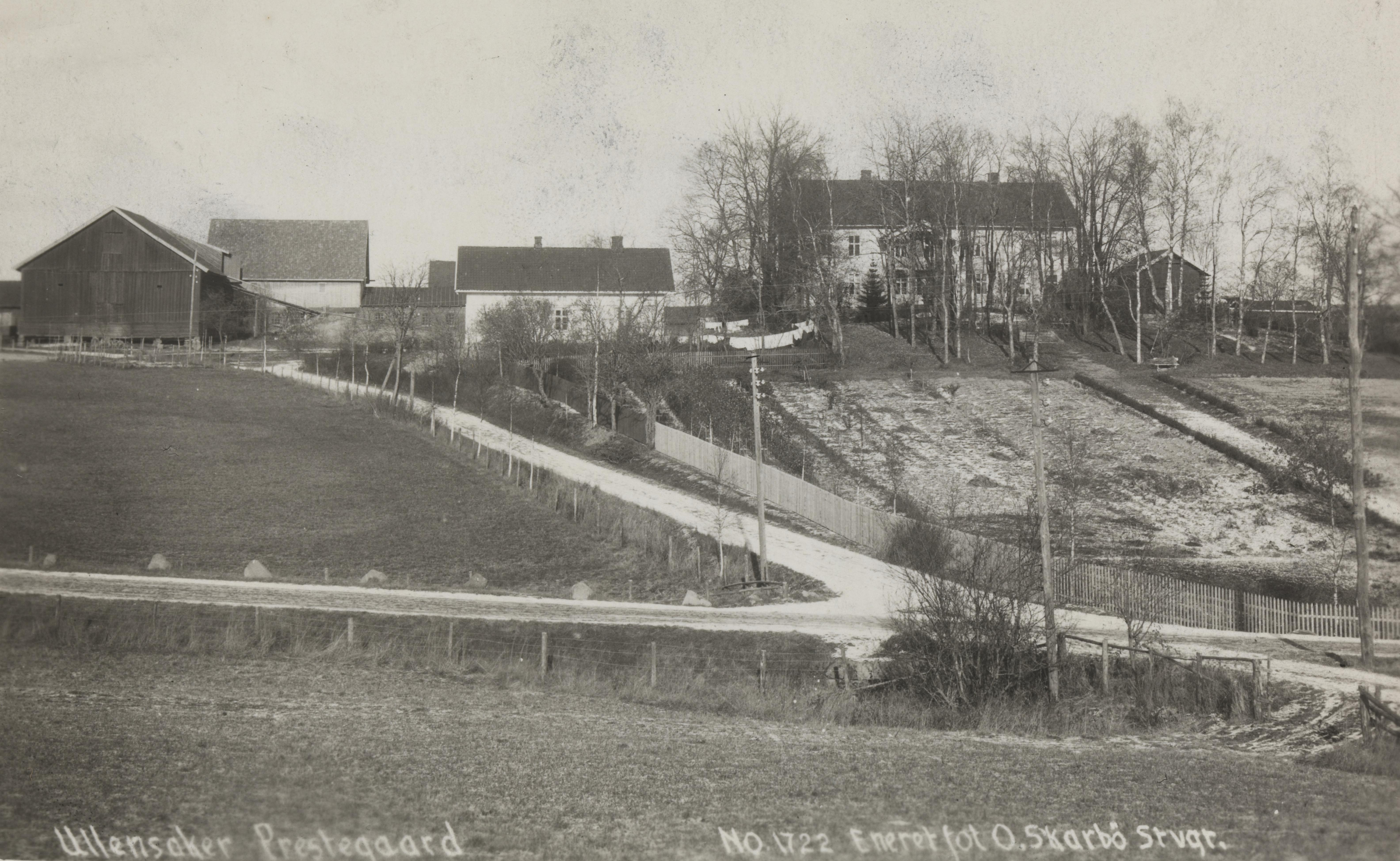 Bildet er hentet fra Nasjonalbibliotekets bildesamling Kløfta, Ullensaker, Akershus